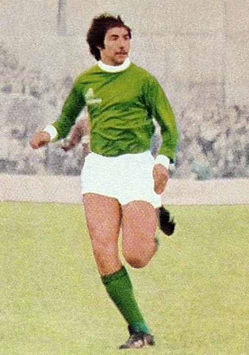 Pierre Repellini en 1972, 'Ageducatifs Football 1972 - 1973', figurina Panini n°220.